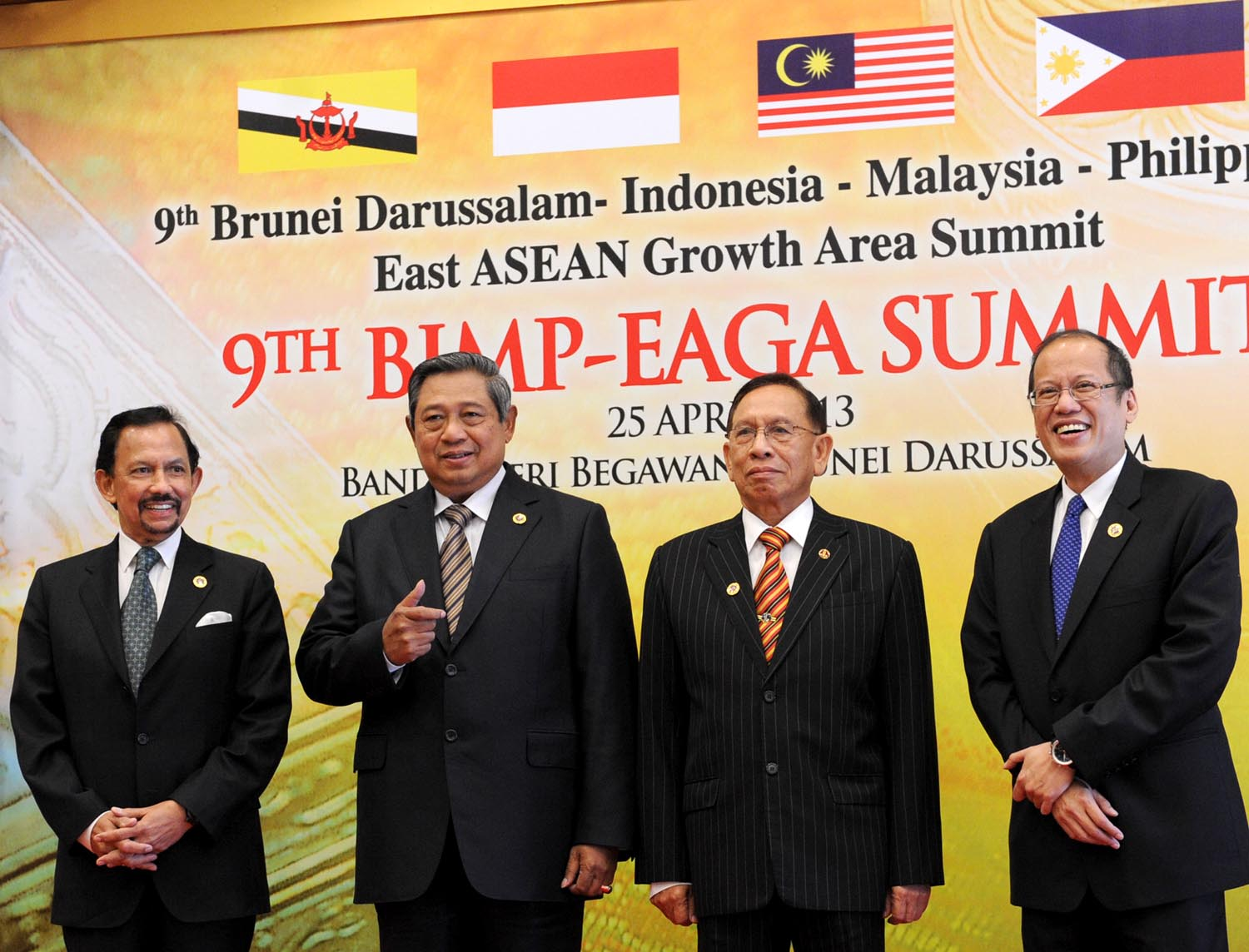 Presiden SBY, Sultan Brunei, utusan PM Malaysia, dan Presiden Filipina hadir di KTT ke-9 BIMP-EAGA di kantor PM Brunei, 25 April 2013.